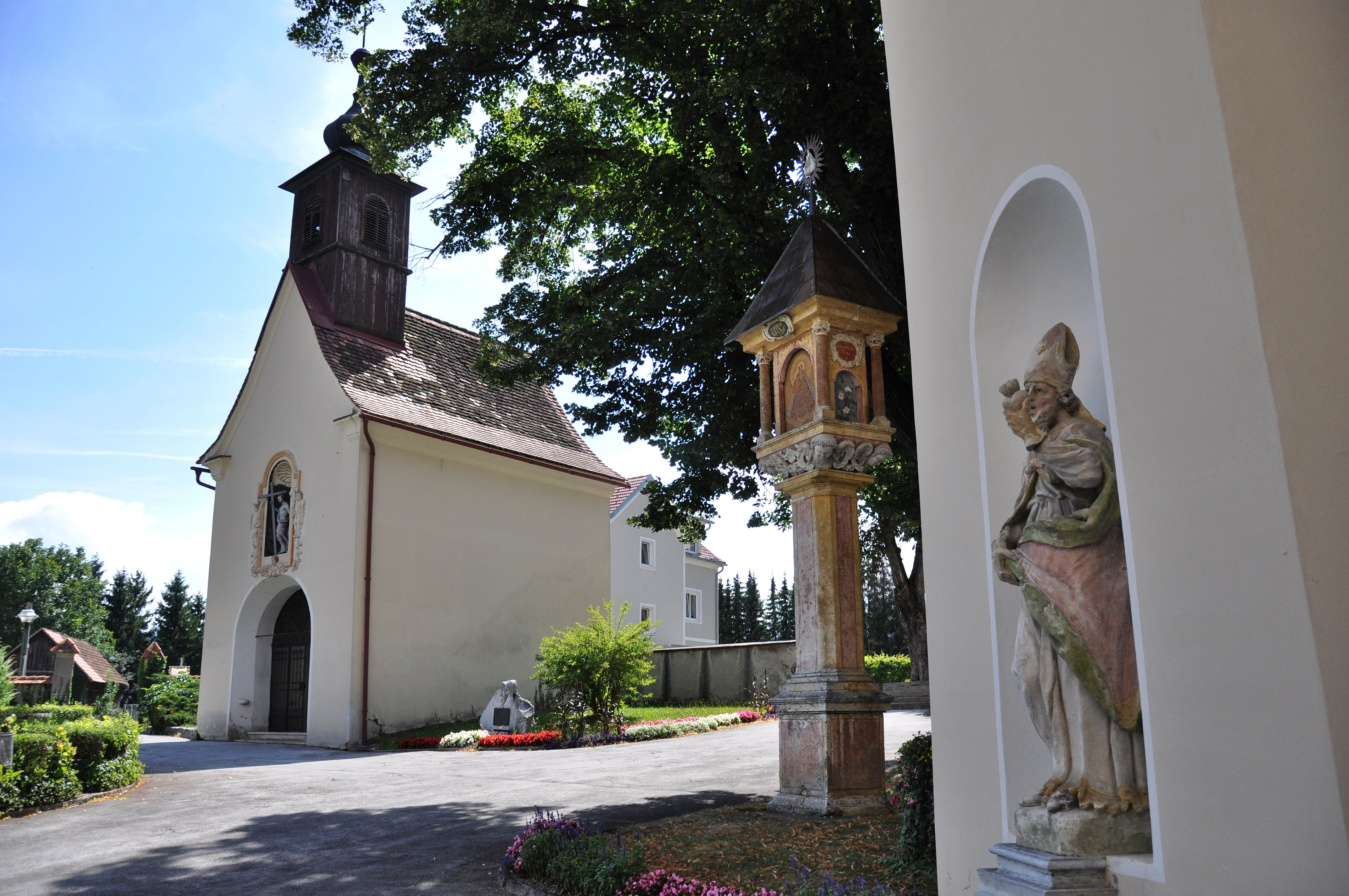 Kirchhof mit Antoniuskapelle und Tabernakelbildstock